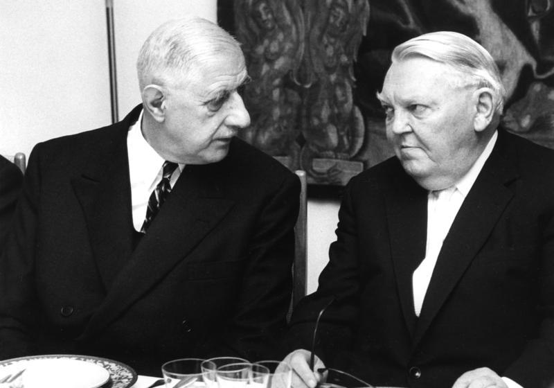 11.6.1965 Besuch des französischen Präsidenten de Gaulle bei Bundeskanzler Ludwig Erhard